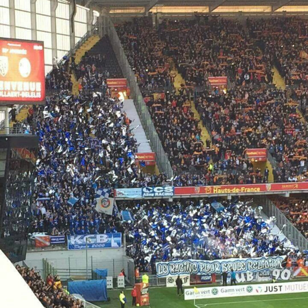 Parcage visiteurs strasbourgeois au stade Bollaert lors de la rencontre Racing Club de Lens - RC Strasbourg Alsace, en Ligue 2. RCL-RCS